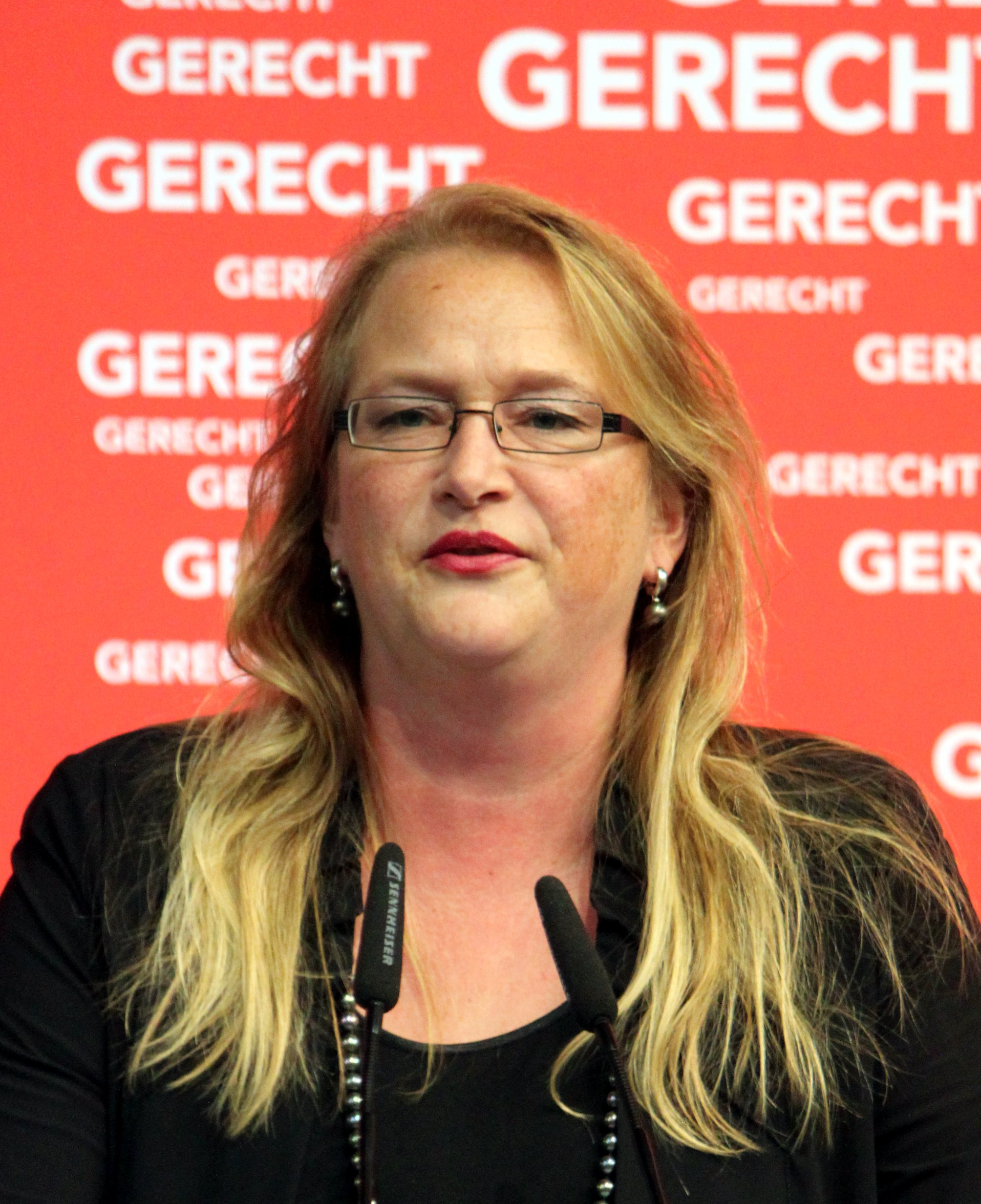 Katrin Budde, Vorsitzende der SPD-Sachsen-Anhalt richtet am 16. November 2012 auf dem Bundeskongress der Jusos Grußworte an die Delegierten in Magdeburg (Deutschland).